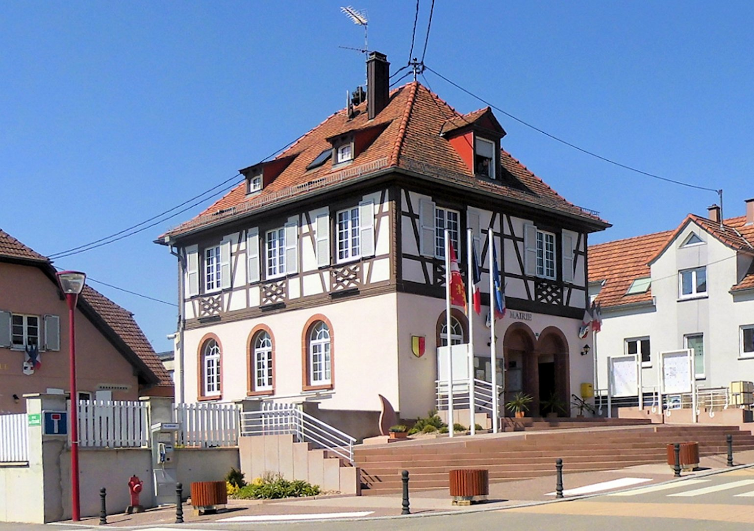 La mairie d'Oberhoffen-lès-Wissembourg